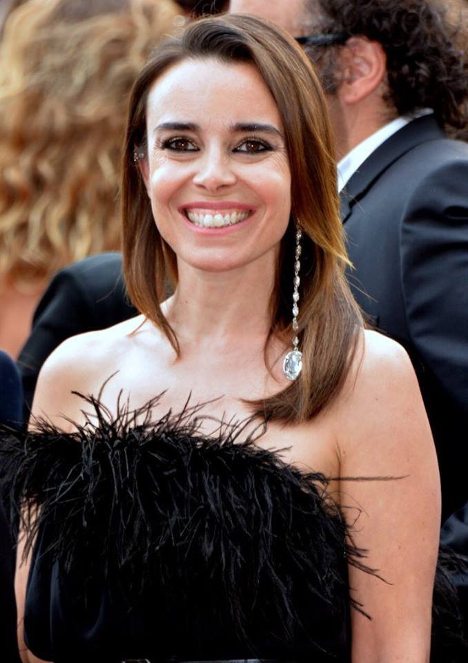 Elodie Bouchez au festival de Cannes